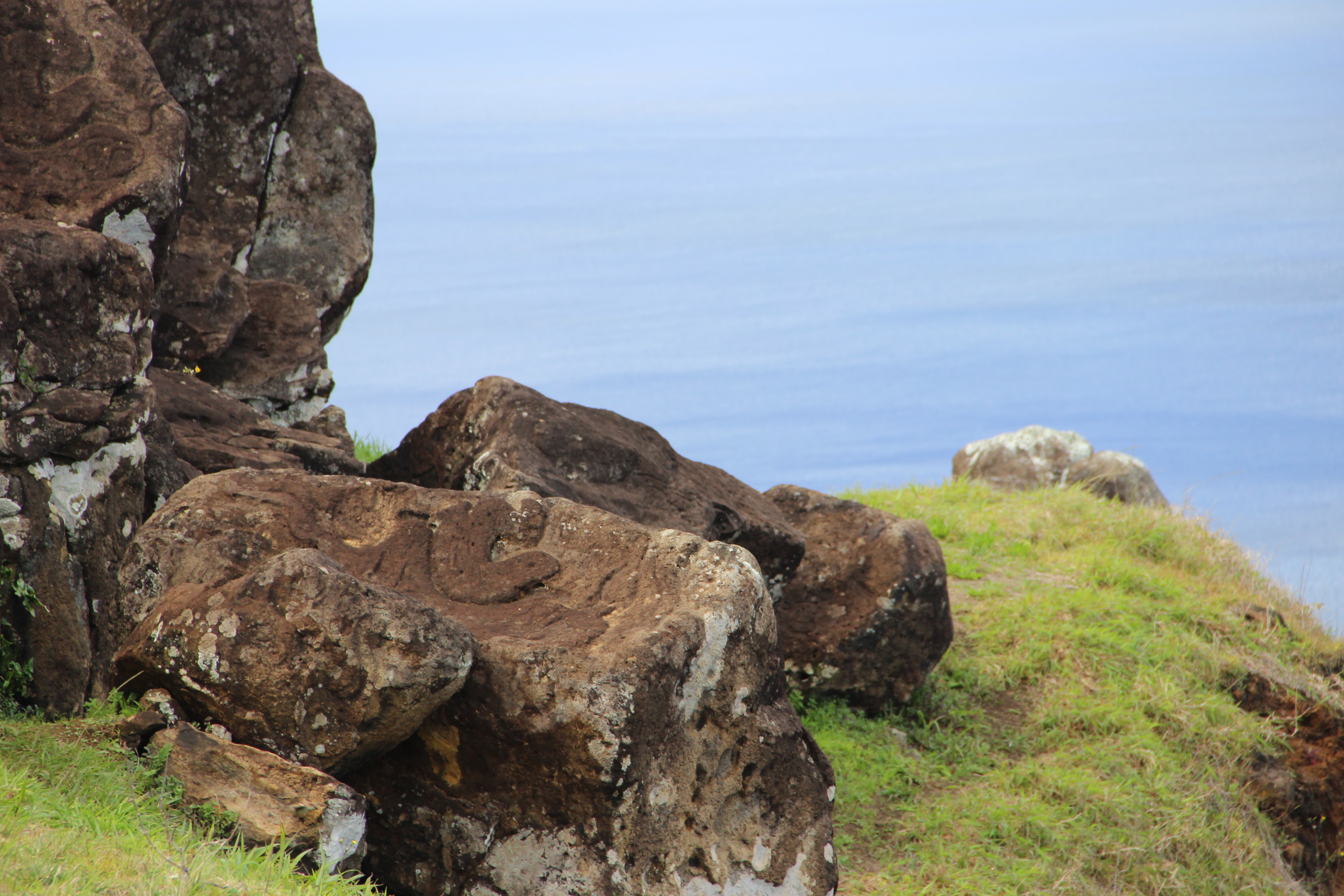 Petrogligos en aldea ceremonial de Orongo en Parque Nacional Rapa Nui This is a photo of a national monument in Chile: 628